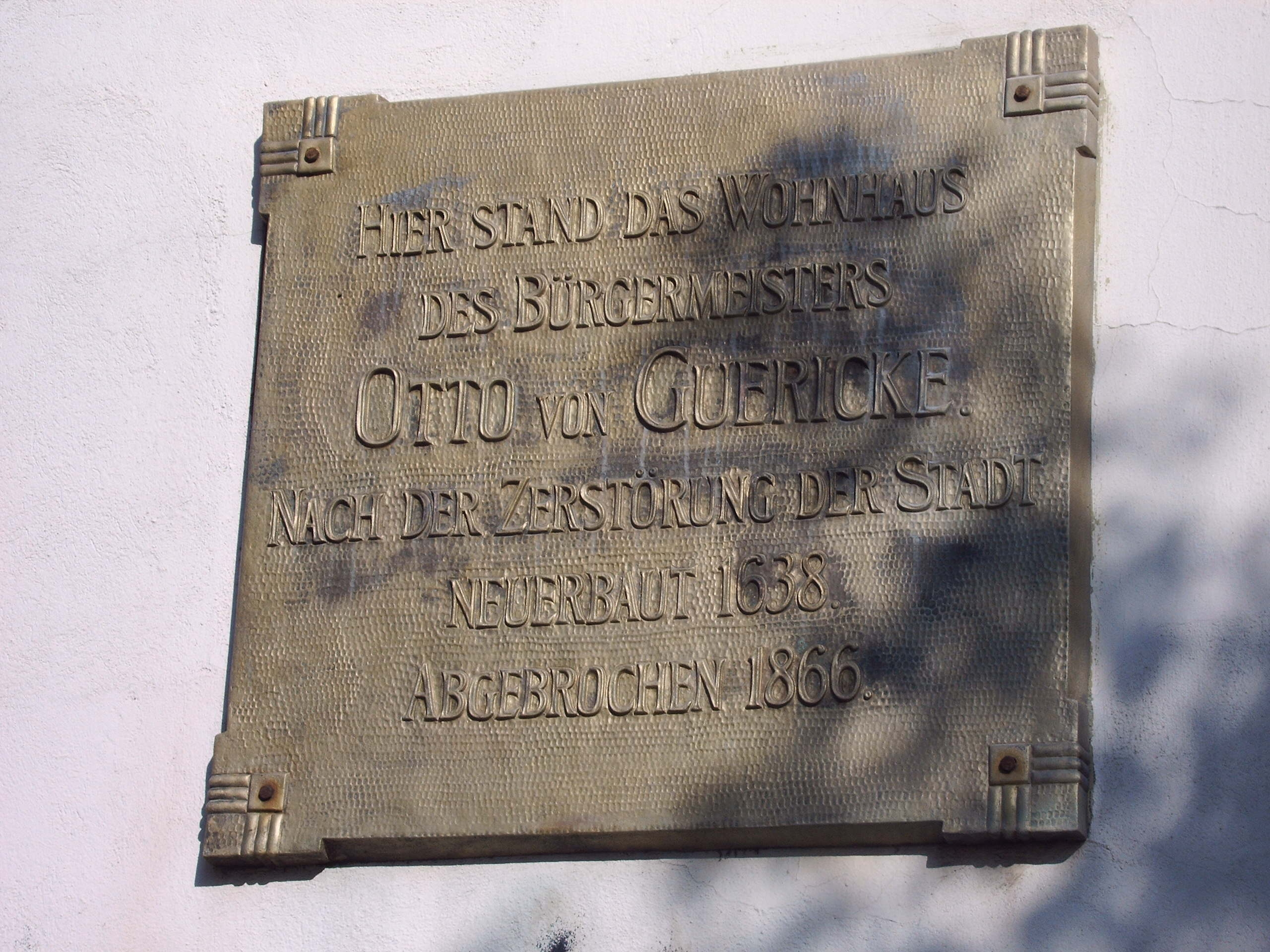 Gedenktafel an das ehemalige Wohnhaus von Otto von Guericke, Magdeburg, Große Münzstraße, Bild aufgenommen am 8.10.2005 von User:Olaf2